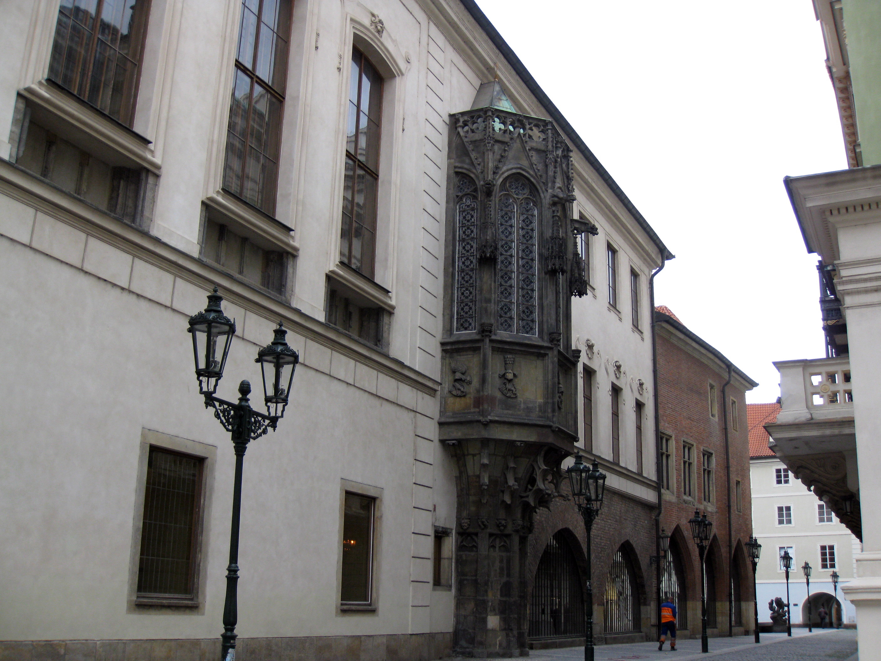 Universita Karolinum (Staré Město), Praha 1, Kamzíková, Celetná, Železná, Ovocný trh 541/9, Staré Město